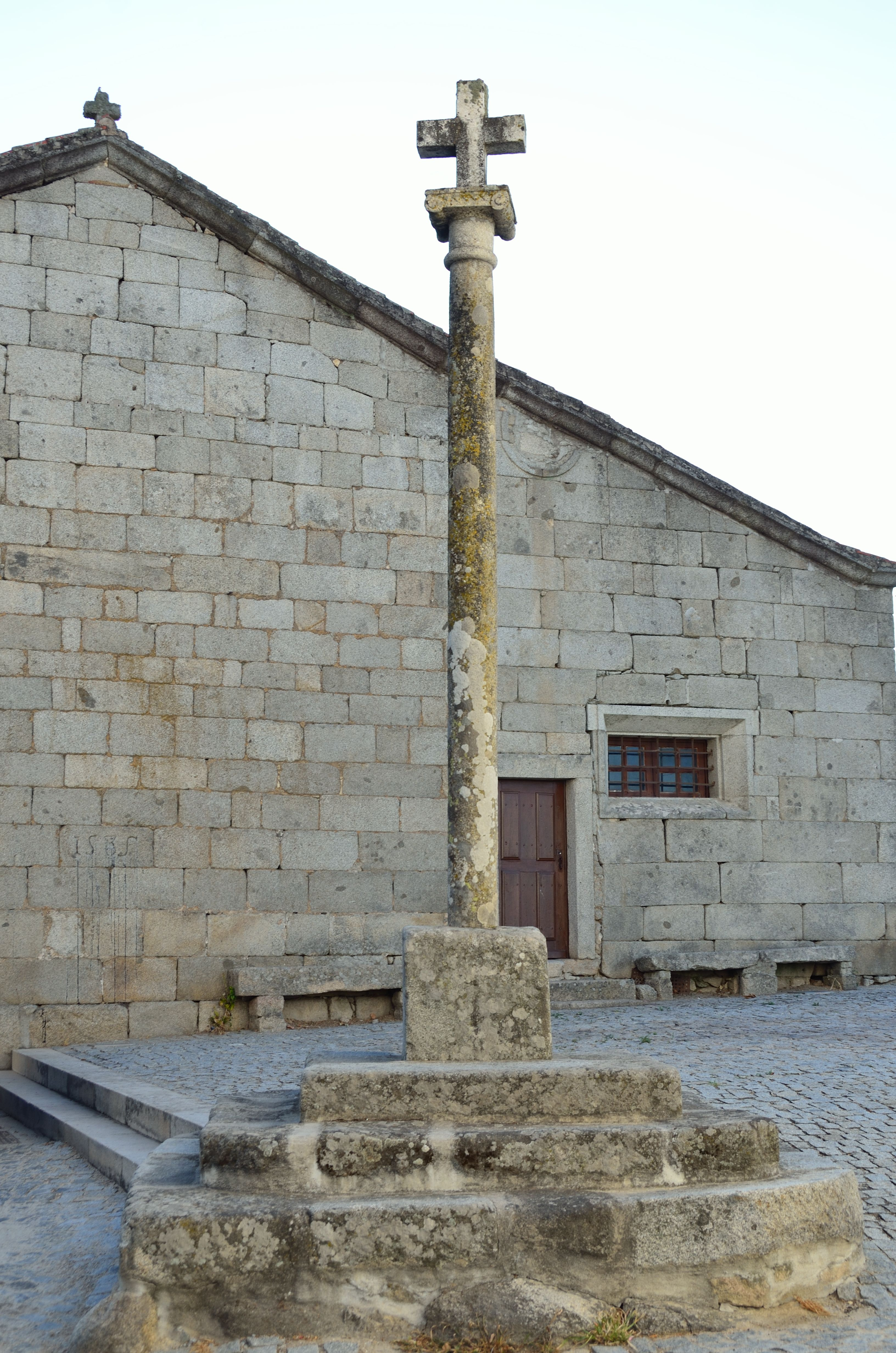 Vista da traseiras da Igreja